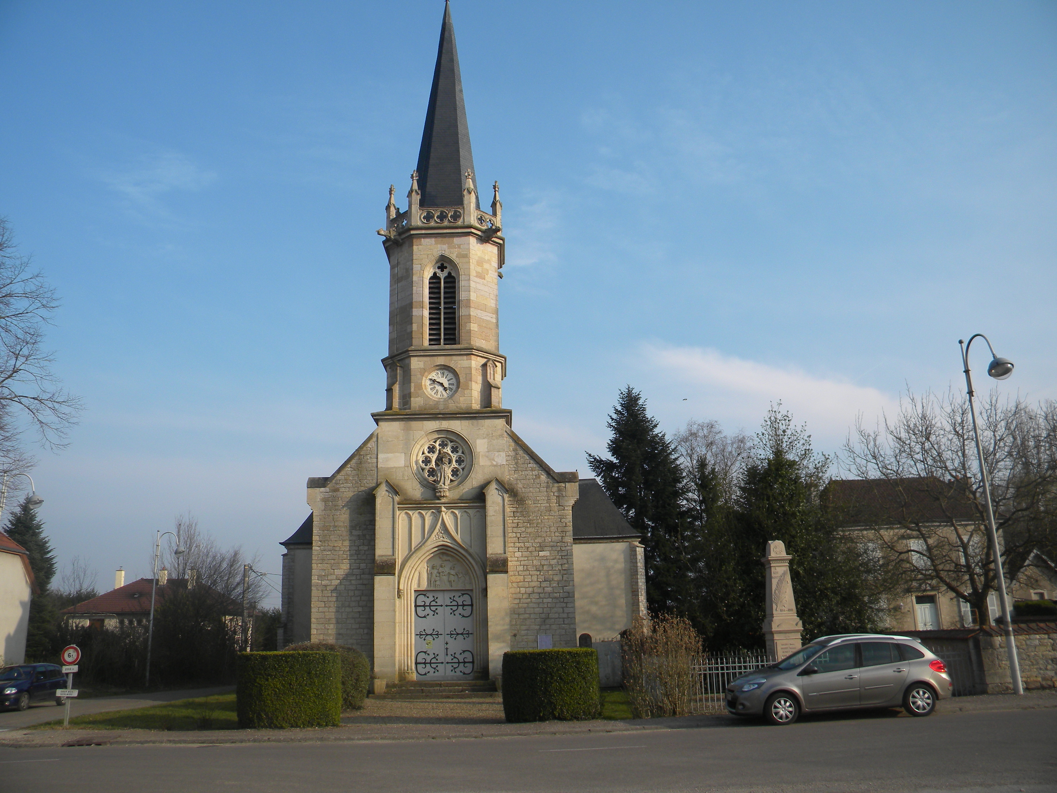 Preĝejo de Magny-Montarlot.